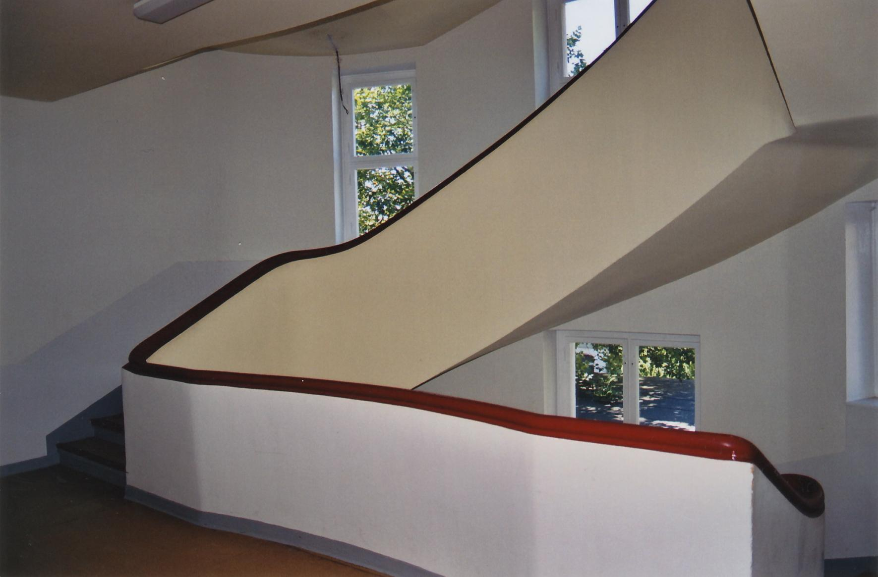 Treppenhaus des ehem. Kath. Krankenhauses Erfurt, Architekt: Karl Meinhardt